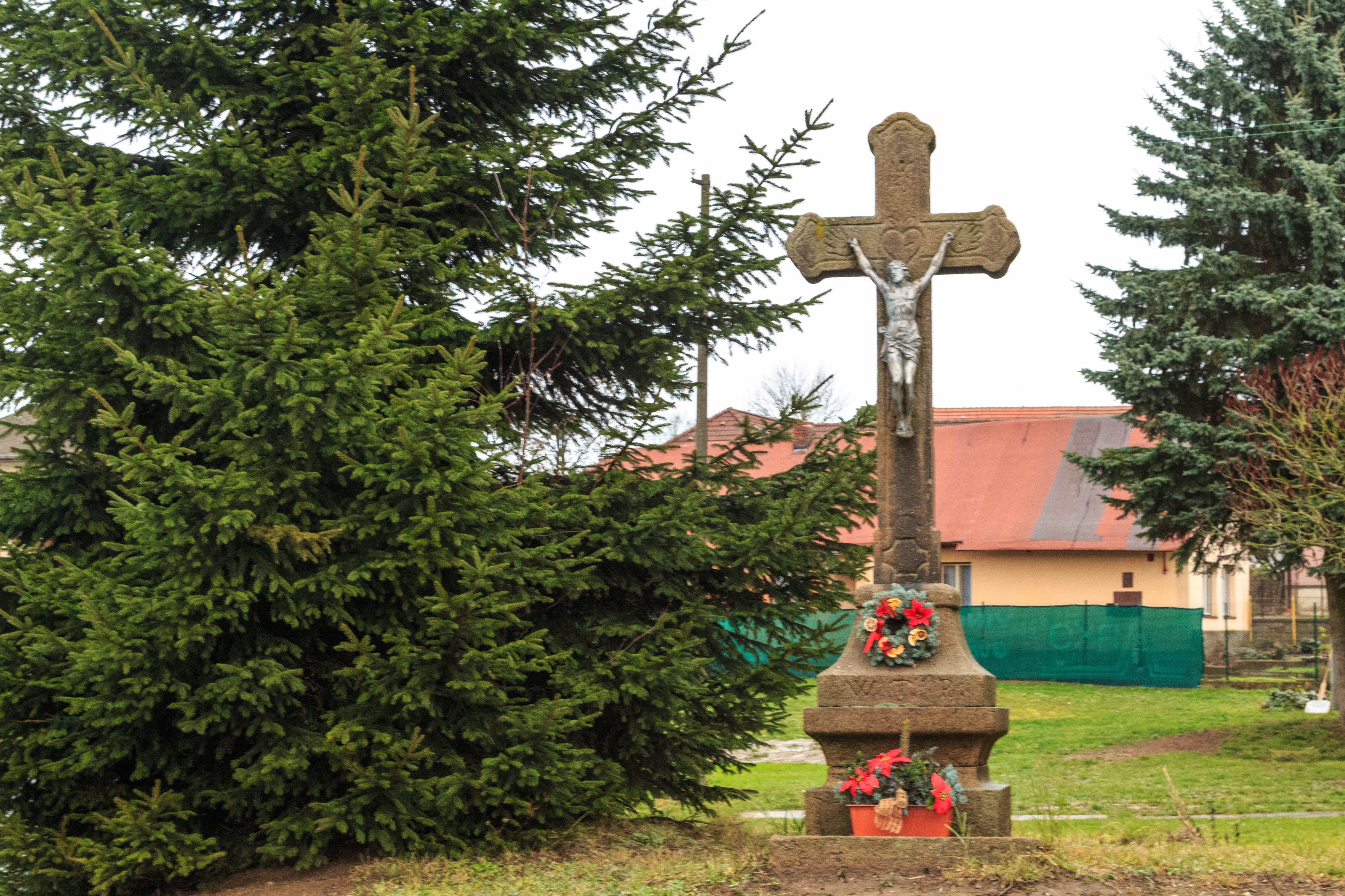 Malčín kříž